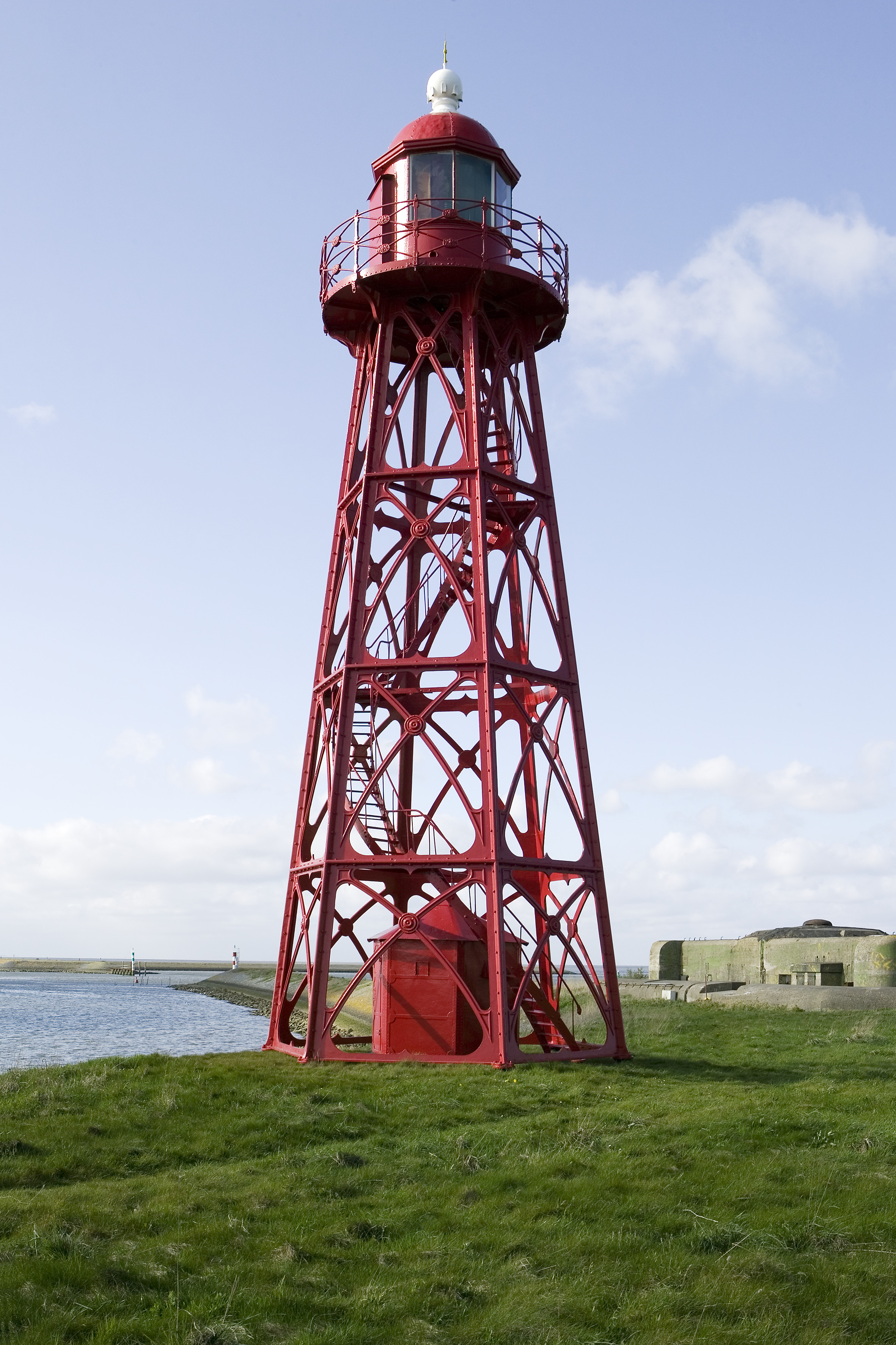 Stevinsluizen: Lichtopstand met een gietijzerenconstructie en op de achtergrond een kazemat